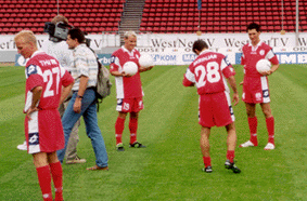 1. FSV Mainz 05 vor dem Mannschaftsfoto-Termin. Spieler von links: Michael Thurk, Christof Babatz, Vjekoslav Škrinjar, Sandro Schwarz.